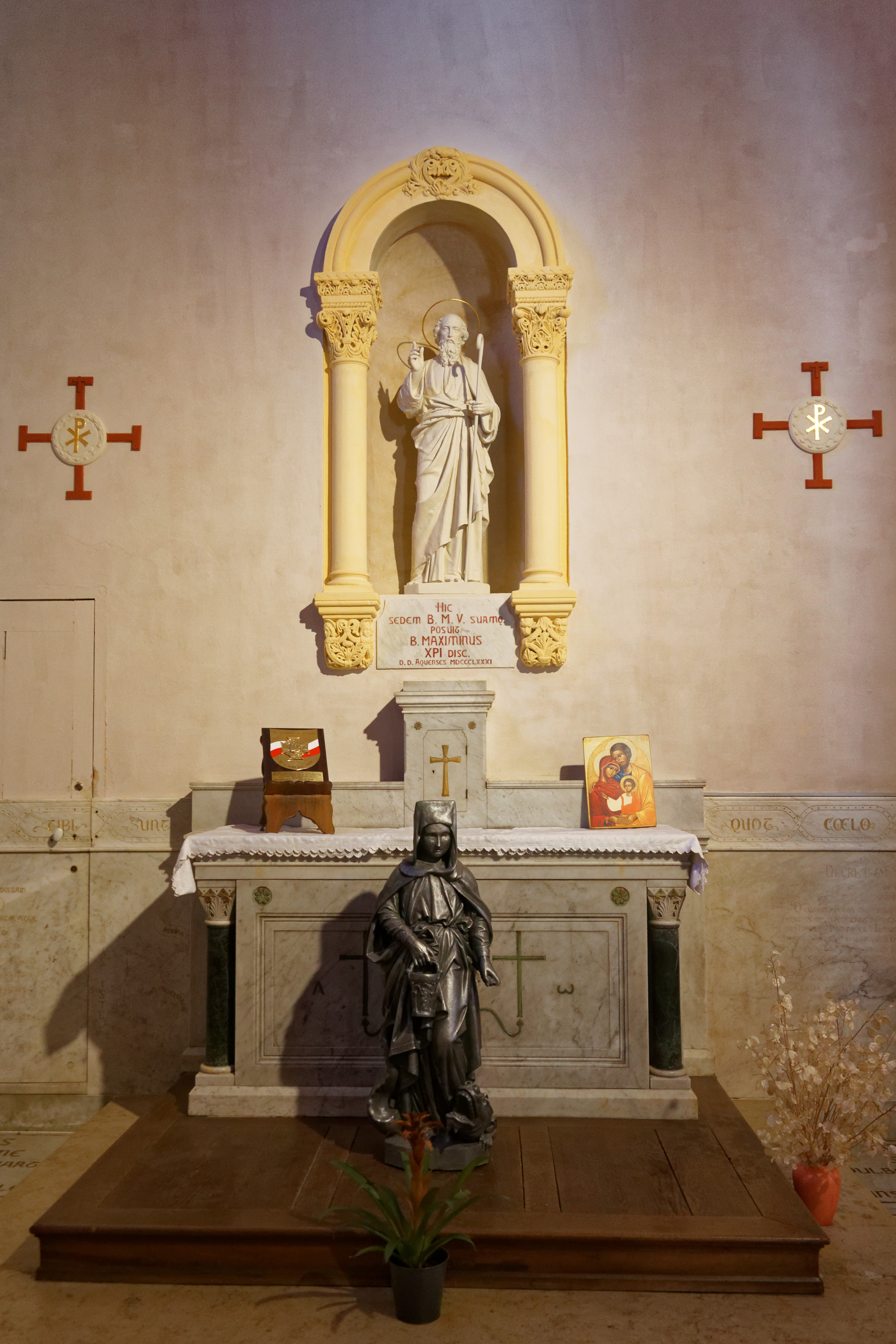 Kirche Notre-Dame de la Seds in Aix-en-Provence, Linker Seitenaltar mit Figur des heiligen Maximinus von Aix, davor Figur der heiligen Martha mit der Tarasque